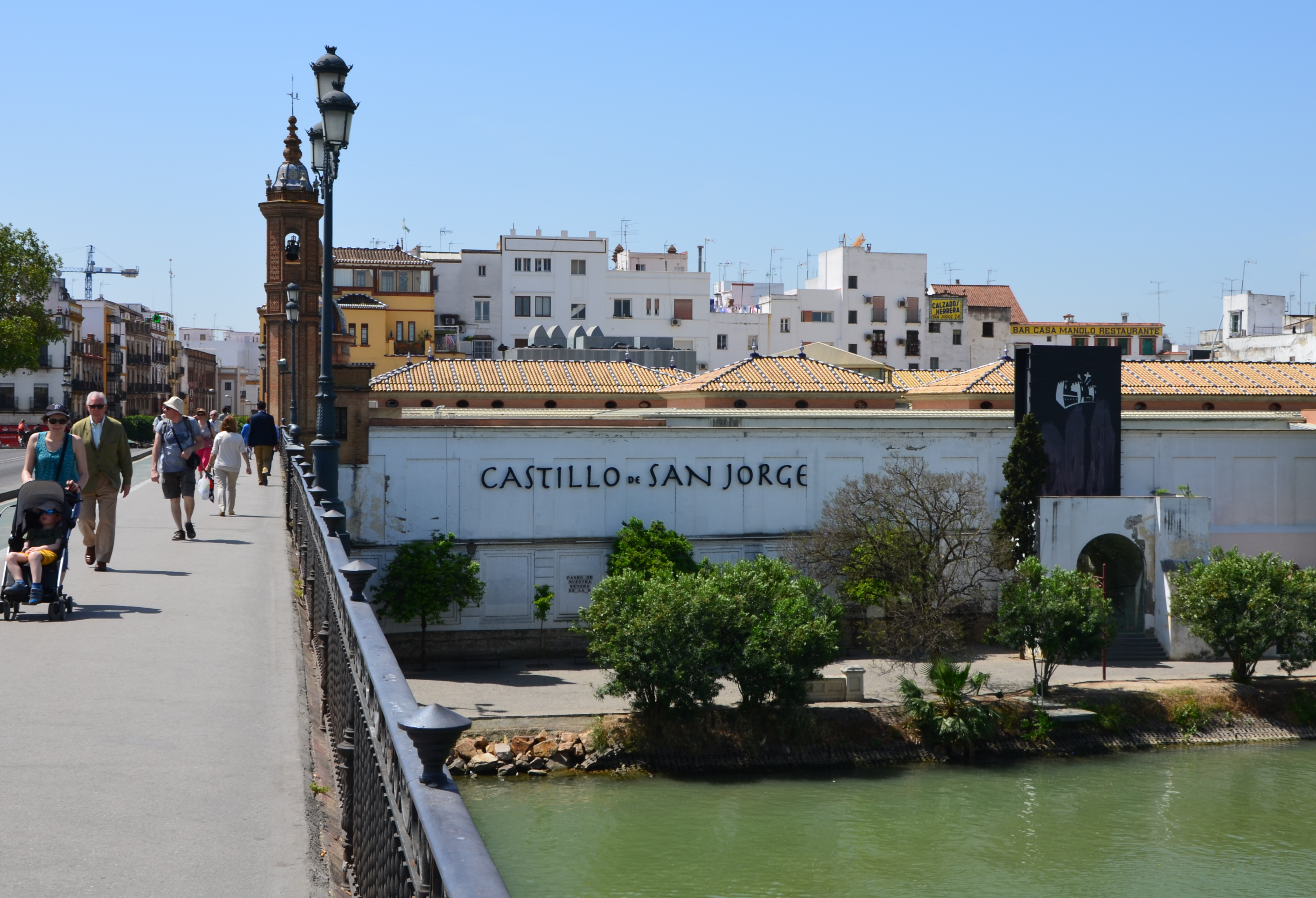 Musée du Château de Saint-Georges de Séville (Espagne), construit sur les ruines du château, depuis le pont de Triana.